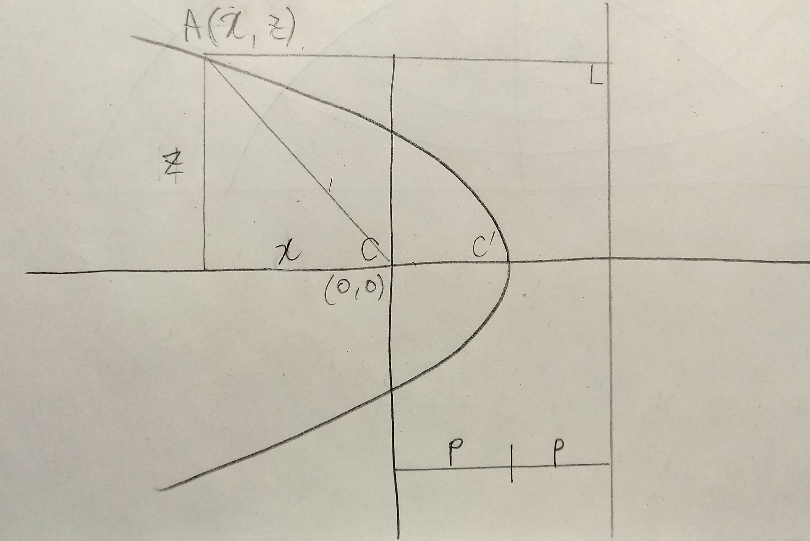 흙댐의 침윤선2